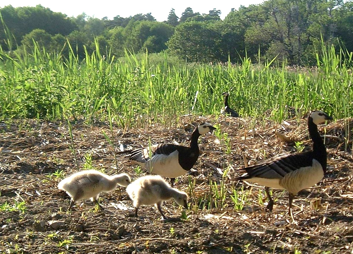 Isbladskärret, Djurgården, Stockholm.